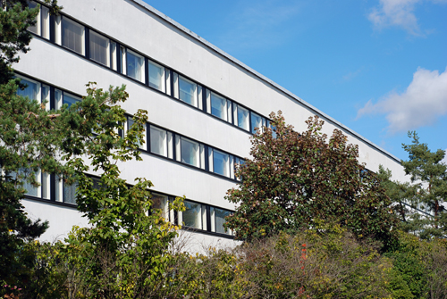 Funktionalismille tyypilliset pitkät ja valoisat nauha-ikkunat